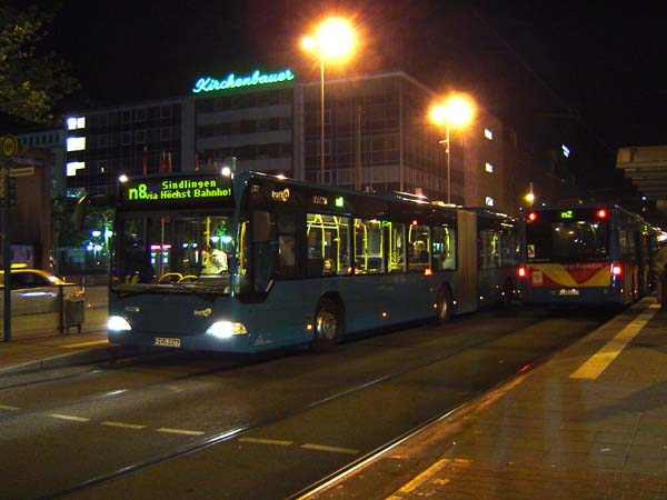 Mercedes-Benz O 530 GN3 - Citaro G mit Frankfurt-Linienbündel D Beklebung